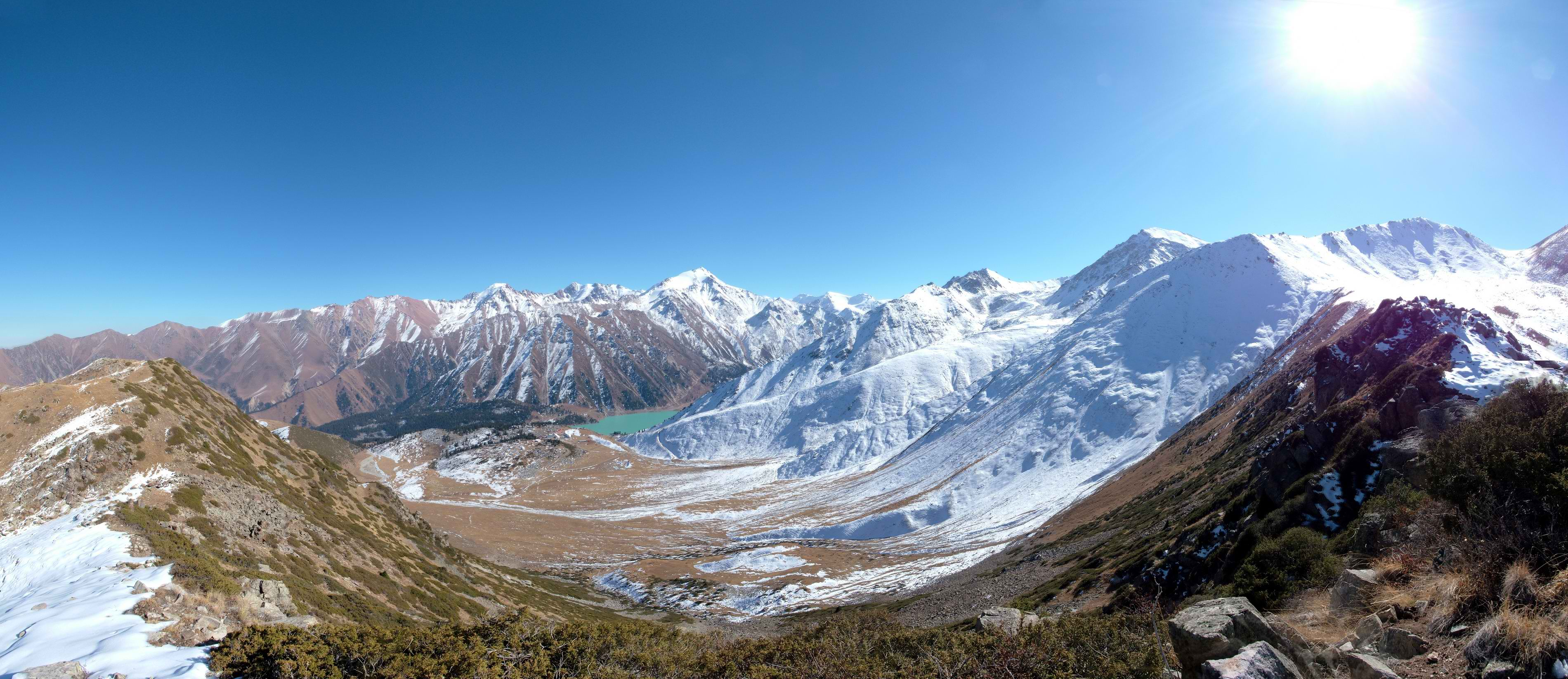 Недалеко от пика